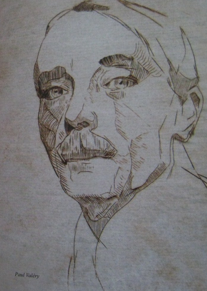 Portrait de l'écrivain Paul Valéry réalisé par Jos Jullien.